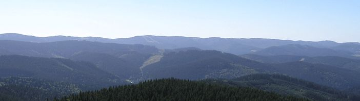 Javorniky (Slovakia)